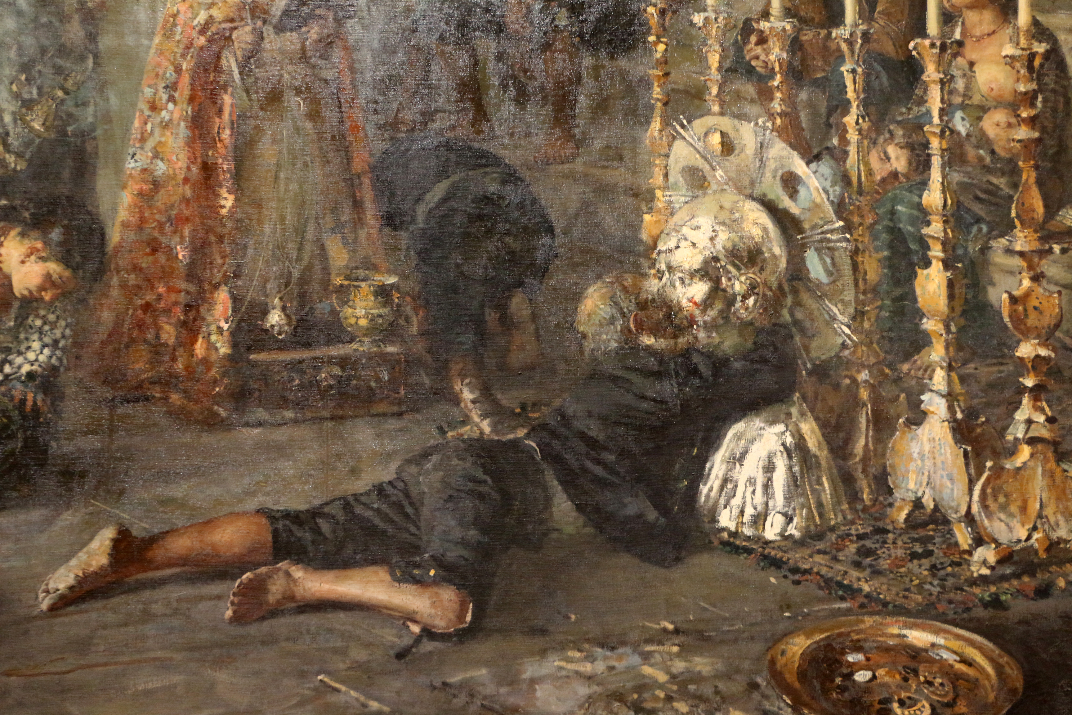 detail